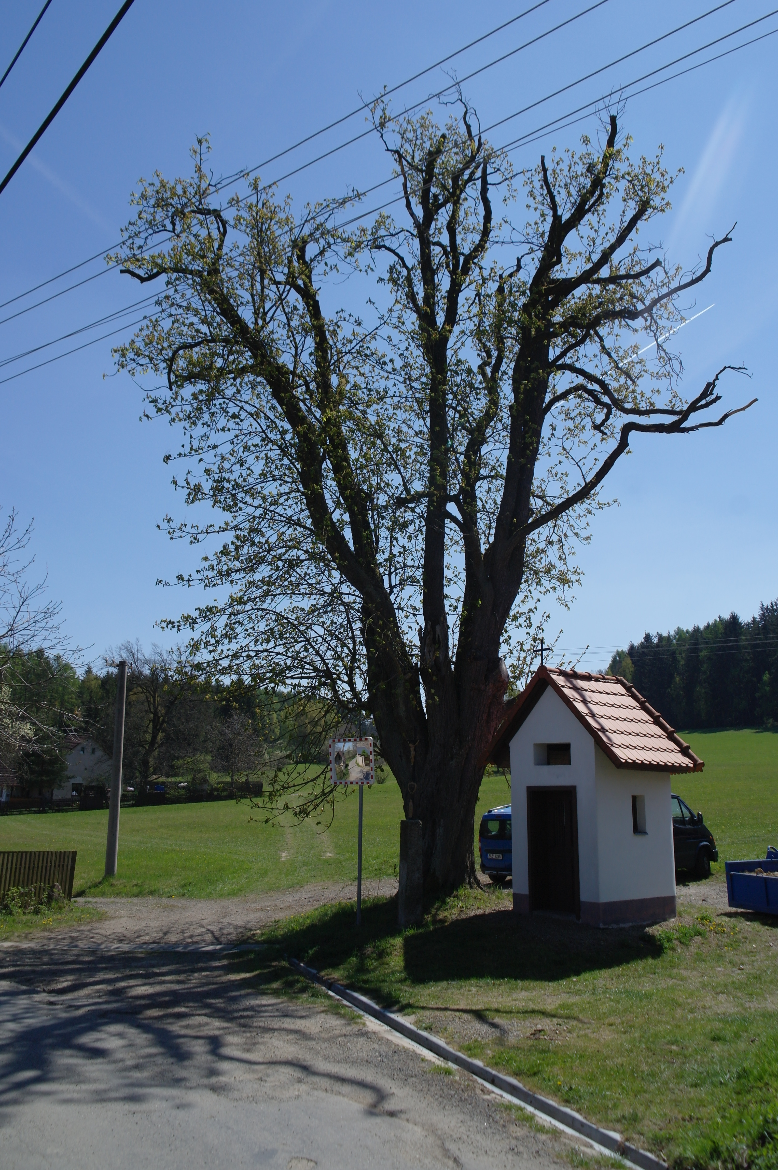 Lesáky. Česká republika.